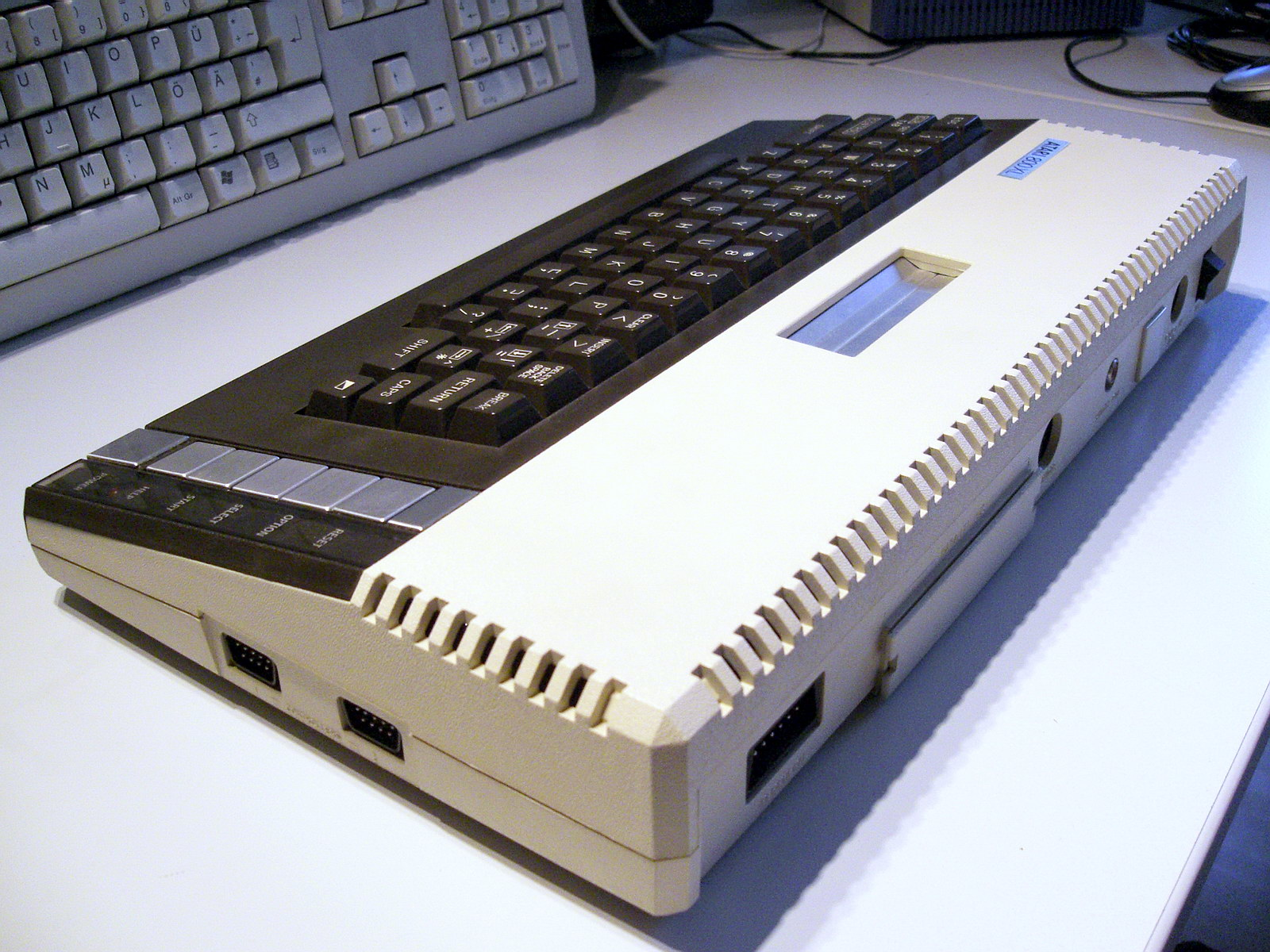 Atari 800XL Rückseite